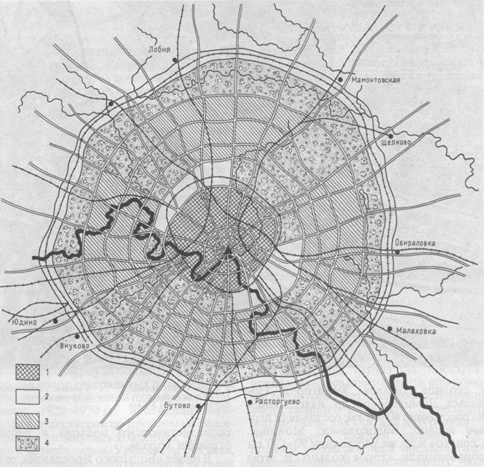 Проект "Большая Москва" С. С. Шестакова. Цифрами обозначено: 1 — Центральный строительный район с общественно-политическим центром; 2 — промышленный район; 3 — новый строительный район; 4 — крупные зелёные насаждения.